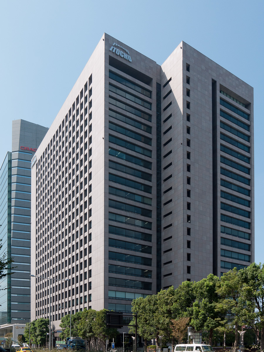 伊藤忠、東京本社。東京都港区北青山2丁目。